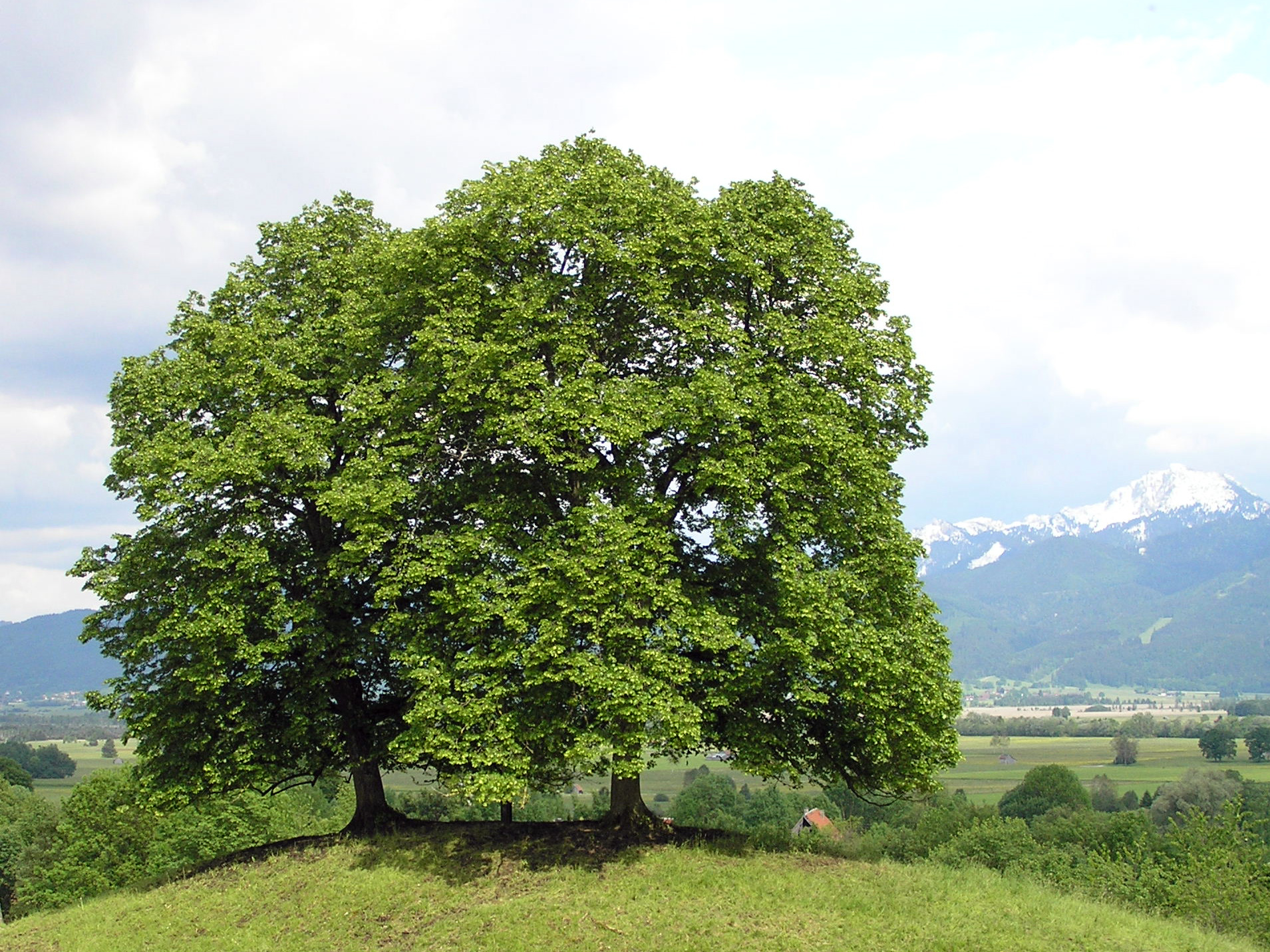 Tilia cordata - Gruppe von 2 Winterlinden auf einem als Viehweide genutzten Hügel am bayerischen Alpenrand mit Blick auf die Benediktenwand